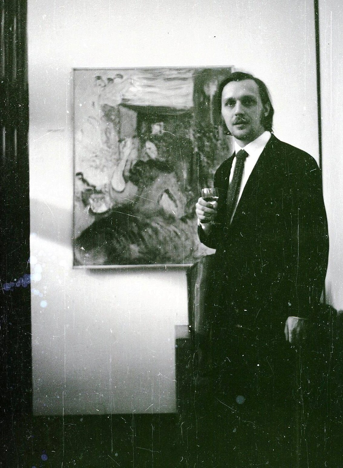 Zbigniew Siestrzeńcewicz na wystawie swoich obrazów w tle obraz "Dziewczyna z tulipanem"